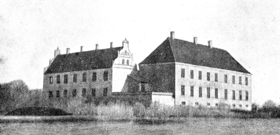 Fjællebro er en gammel hovedgård, den nævnes i 1462 for første gang. Fjællebro ligger i Herringe Sogn, Sallinge Herred, Ringe Kommune. Hovedbygningen er opført i 1622